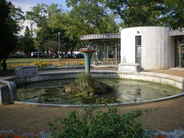 Széchenyi fürdő - Kettes számú kút (Budapest, XIV. ker.)